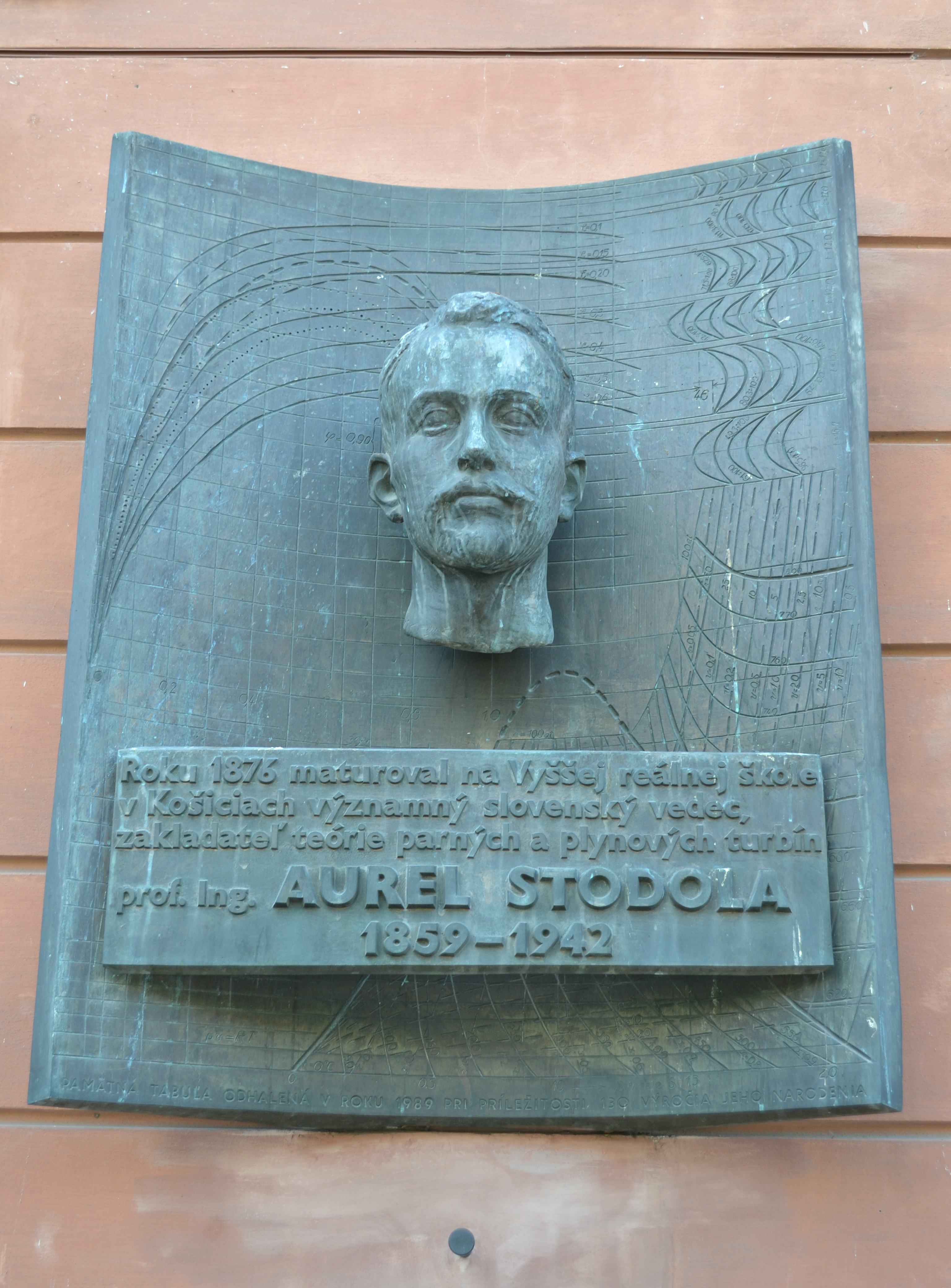 Pamätná tabuľa s bustou, Hlavná ul. 88, v tejto budove (Vyššia štátna reálka) maturoval Aurel Stodola, slovenský fyzik, technik, zakladateľ teórie parných a plynových turbín